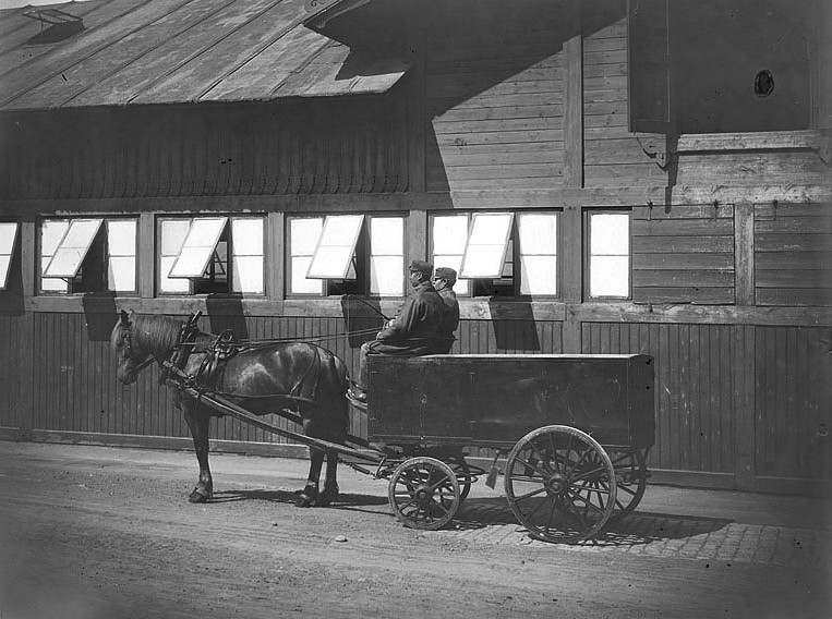 Latrinvagn med häst